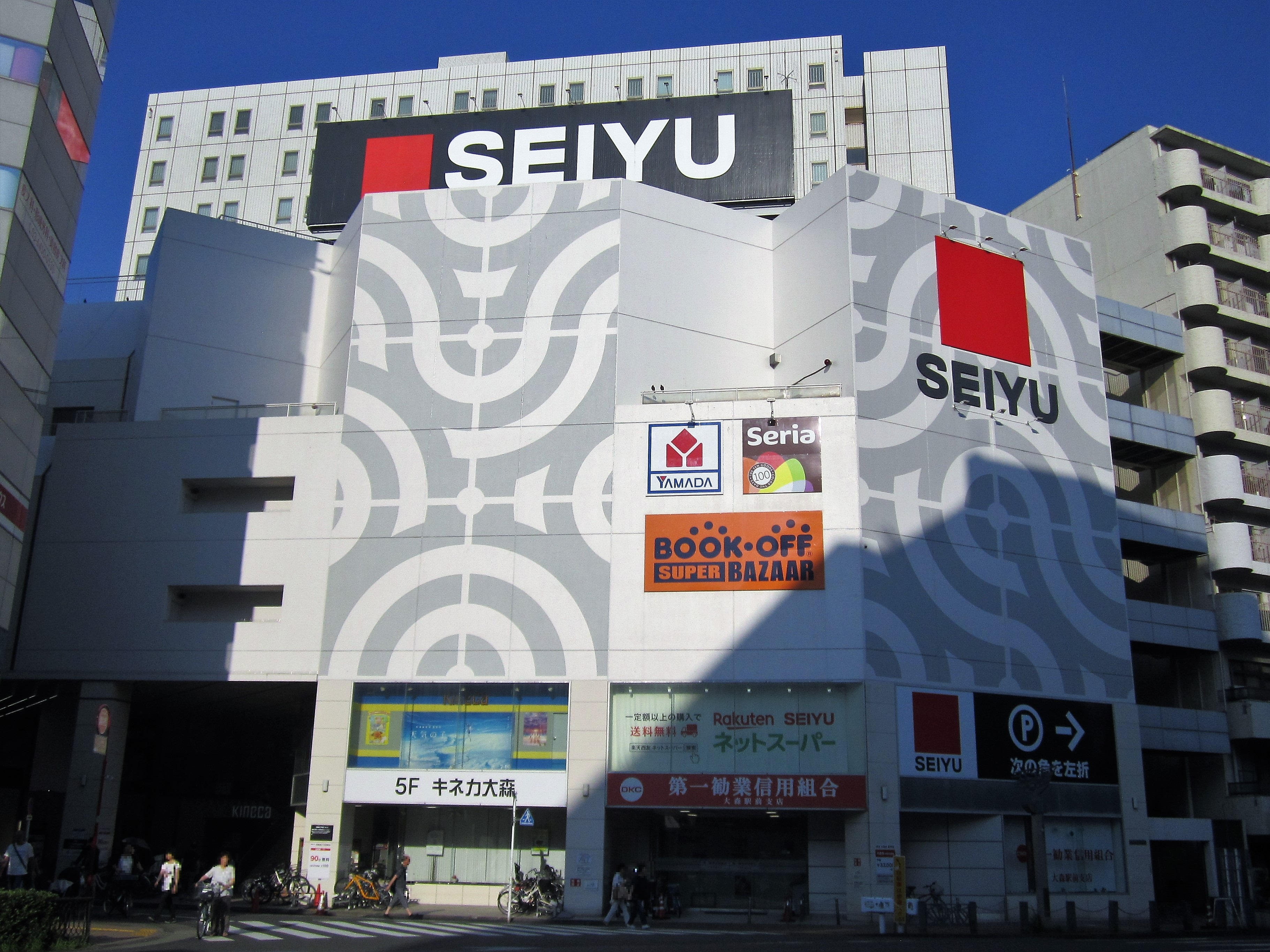 西友大森店（品川区南大井）